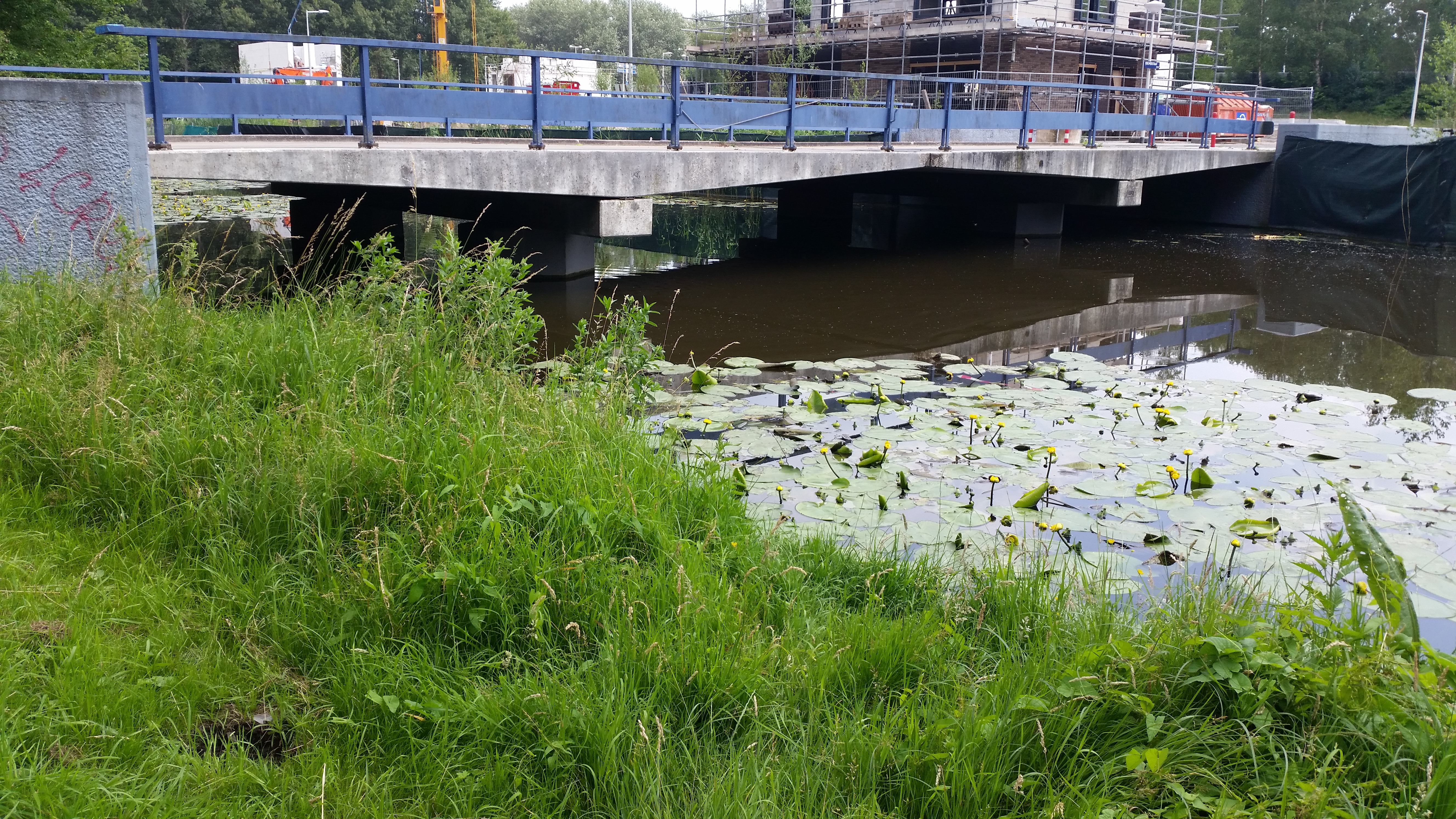 Brug 989, Muiderbergbrug, overspanning